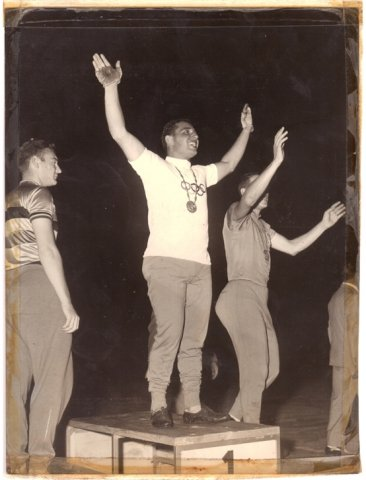 Sante Giovanni Gaiardoni, nato a Villafranca il 29 giugno 1939, pistard italiano, vittorioso alle Olimpiadi di Roma del 1960.